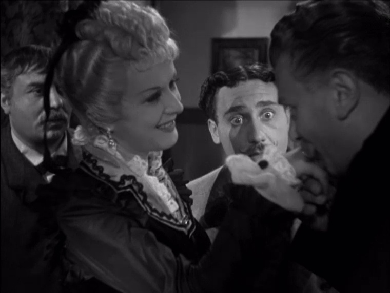 Screenshot del film "Le miserie del signor Travet" di Mario Soldati, 1945